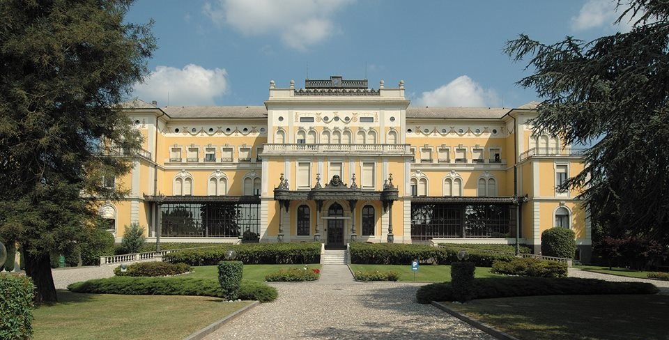 Villa Caproni (oggi Villa Malpensa) a Vizzola Ticino (VA) - Italia